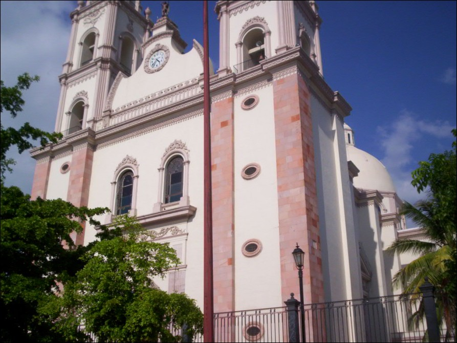 author: MightyKC Location: Culiacán, Sinaloa, México Info: Catedral de Culiacán